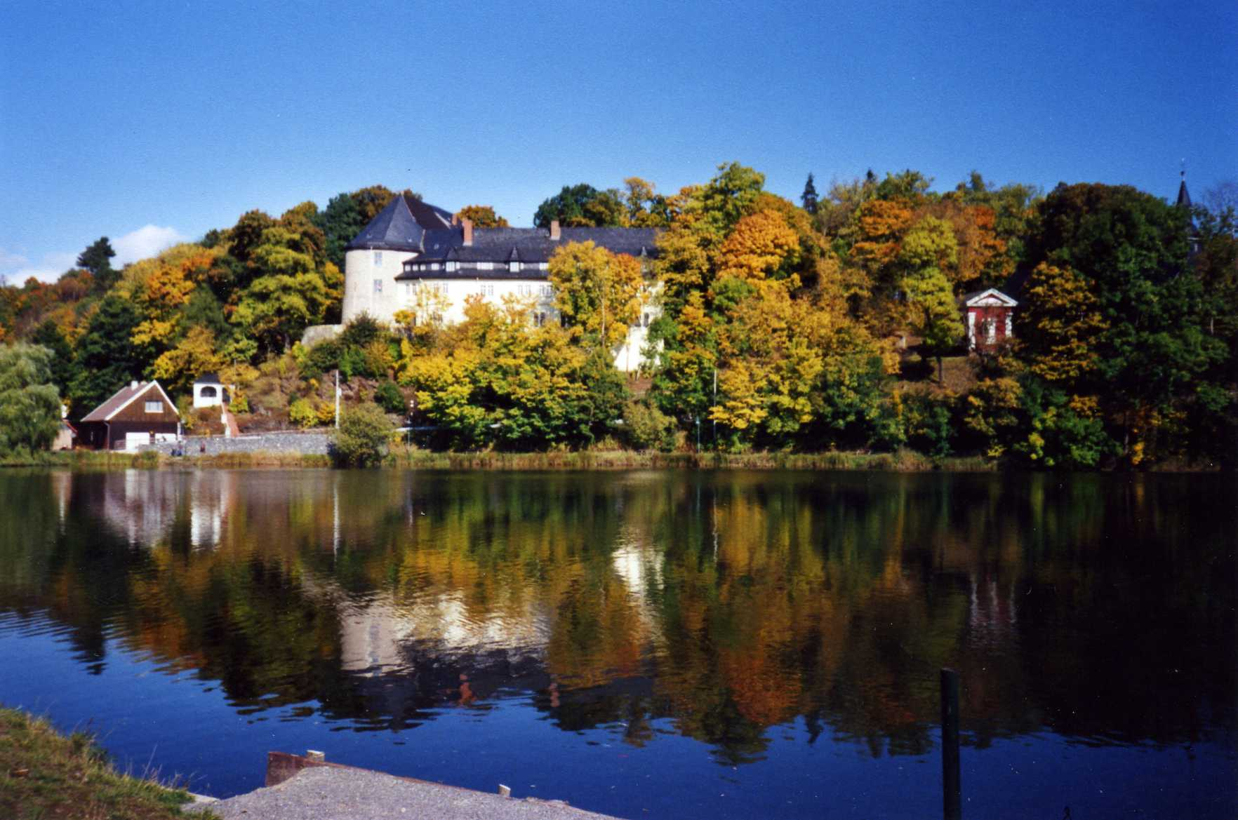 Schloss Stiege